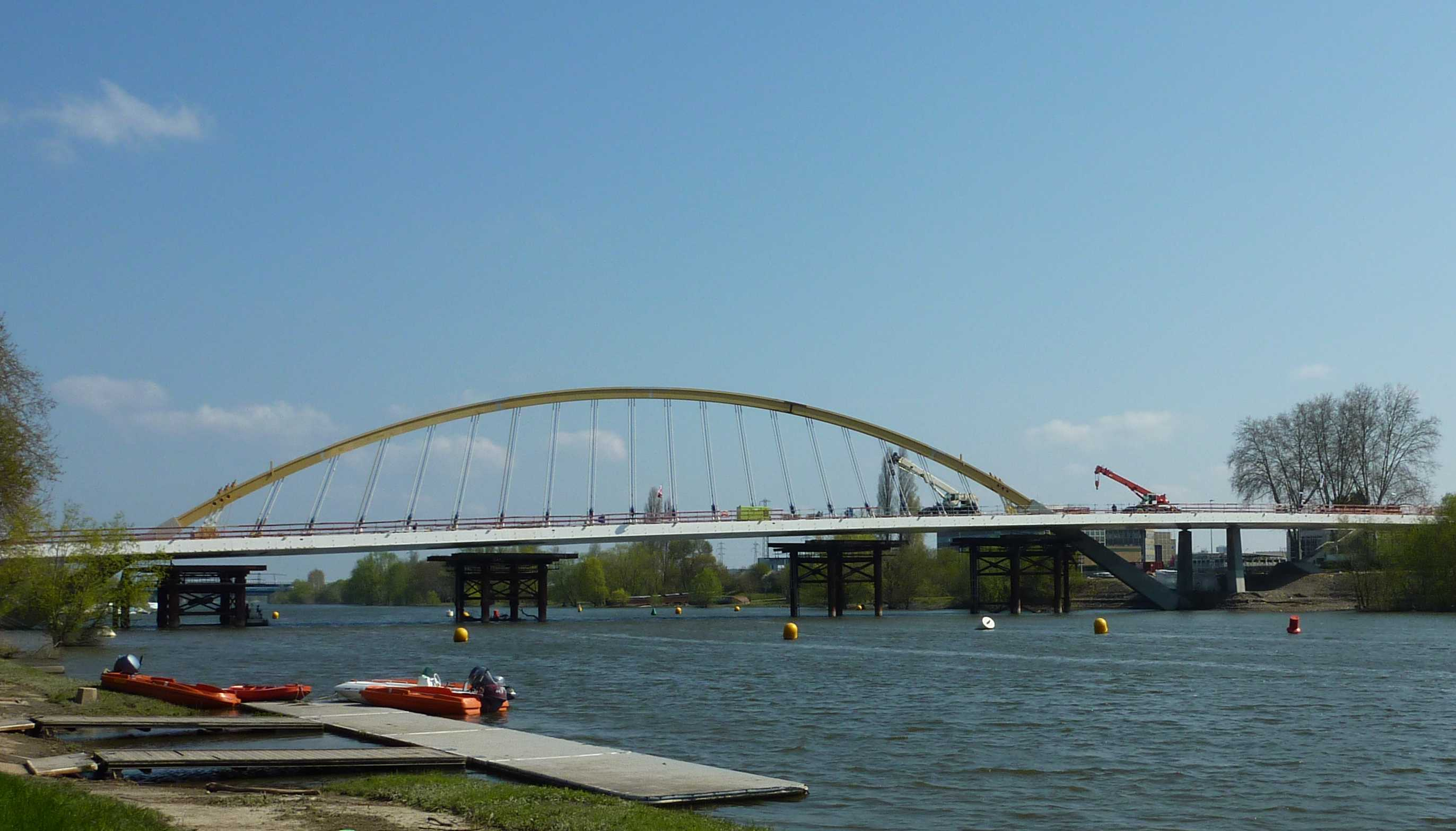 Pont Confluences sur la Maine à Angers (Maine-et-Loire, France)